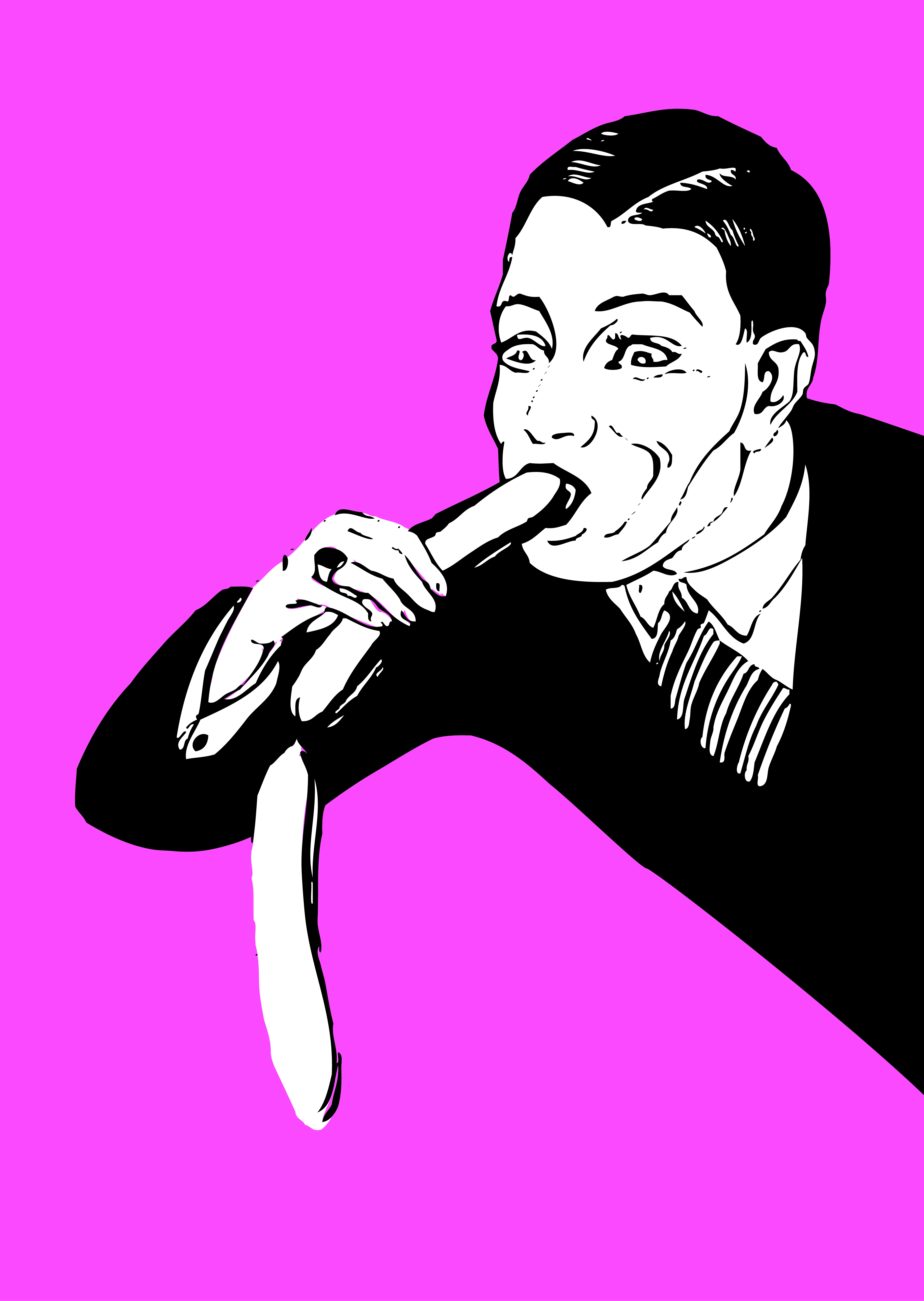 Le Zuzeln